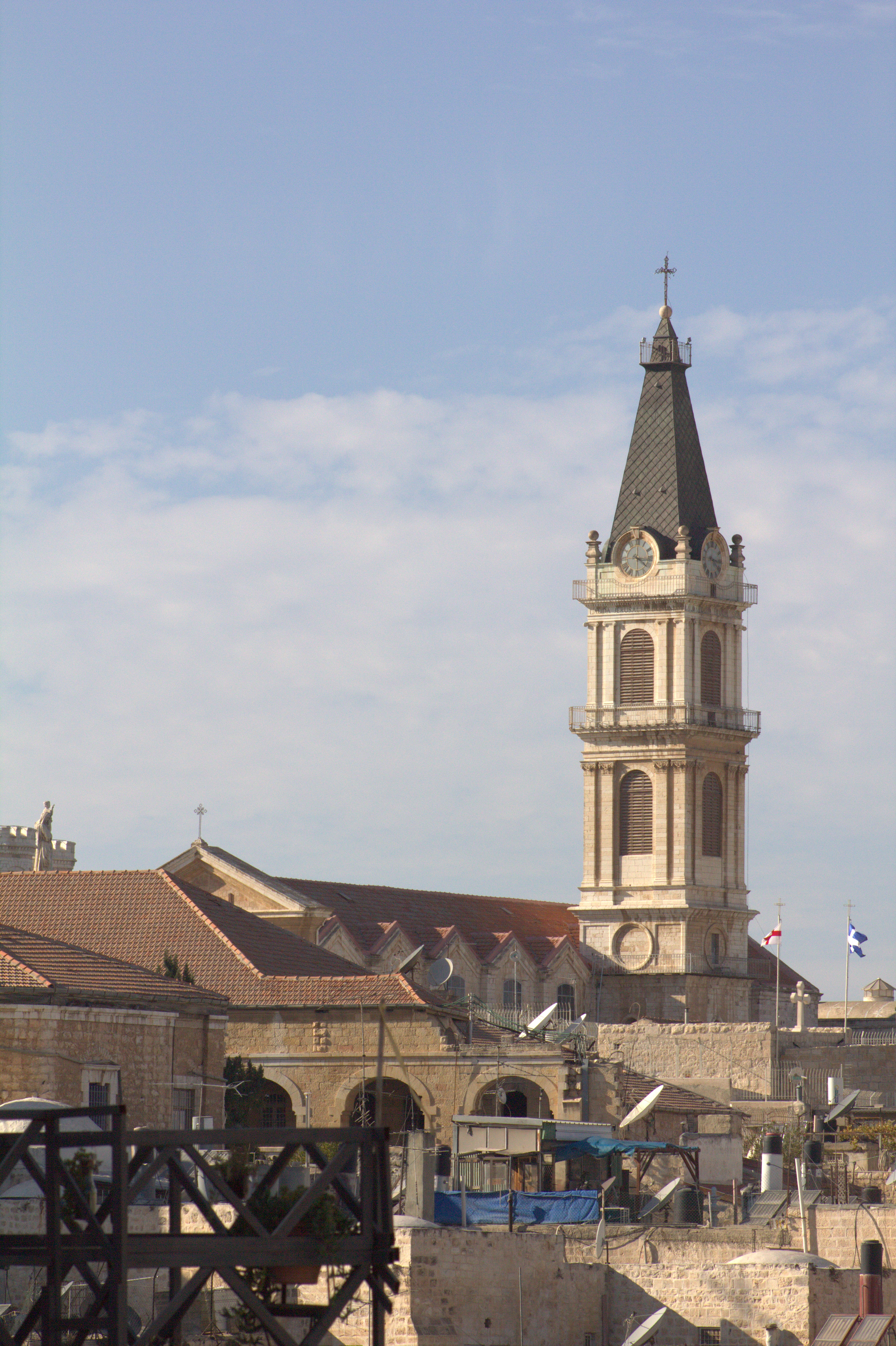 מנזר סן סלוודור (המושיע הקדוש - הכוונה לישו) הוא מנזר פרנציסקני ברחוב סנט פרנסיס ברובע הנוצרי שבעיר העתיקה. המבנה כולל בזיליקה ומגדל פעמונים. This is a photo of a heritage building in Israel. Its ID is 1-3000-203